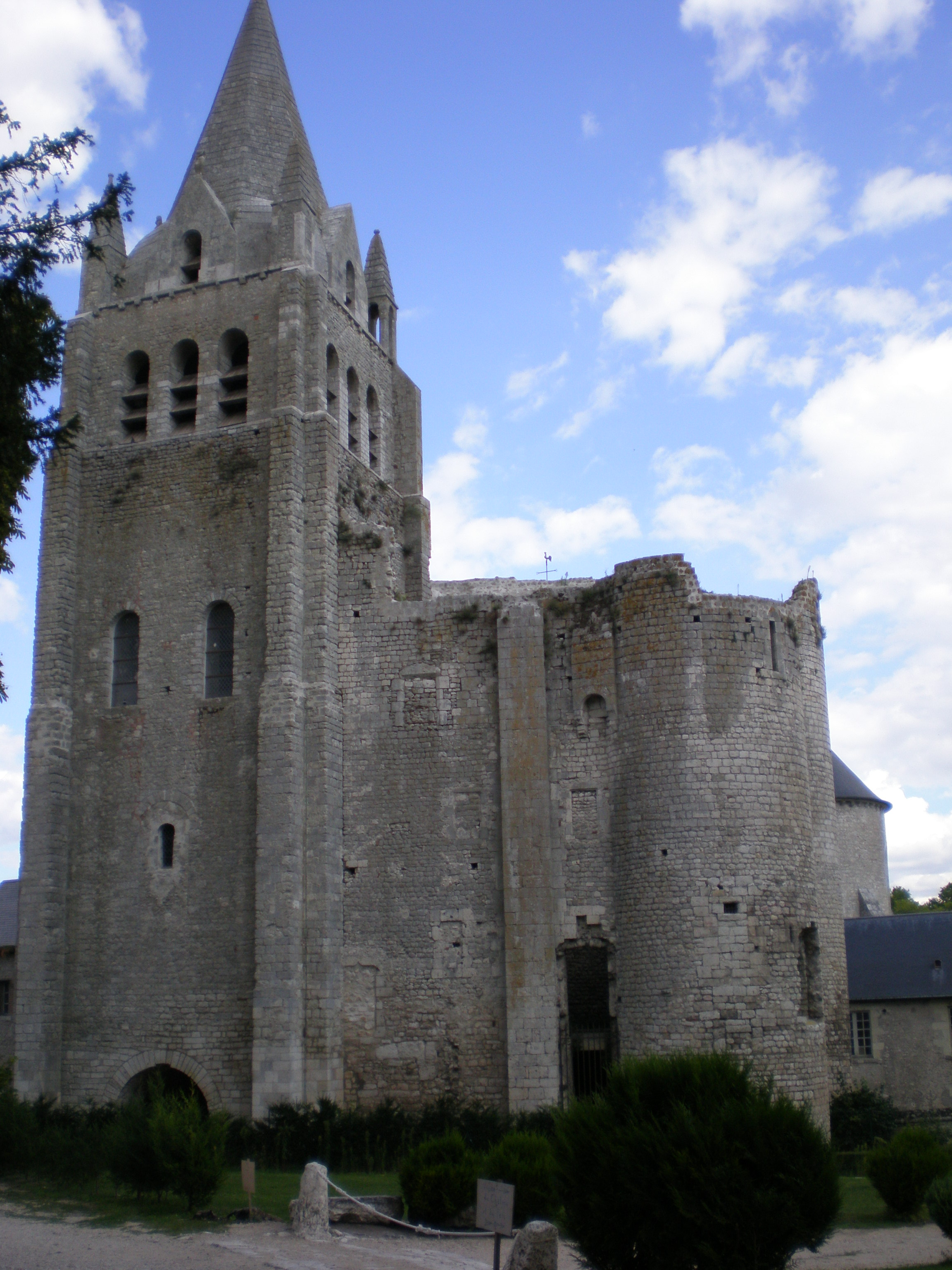 Collégiale Saint-Liphard de Meung-sur-Loire (Classé) .